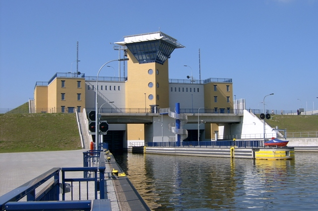 Schleuse Hohenwarthe Photo: R. Vorreyer